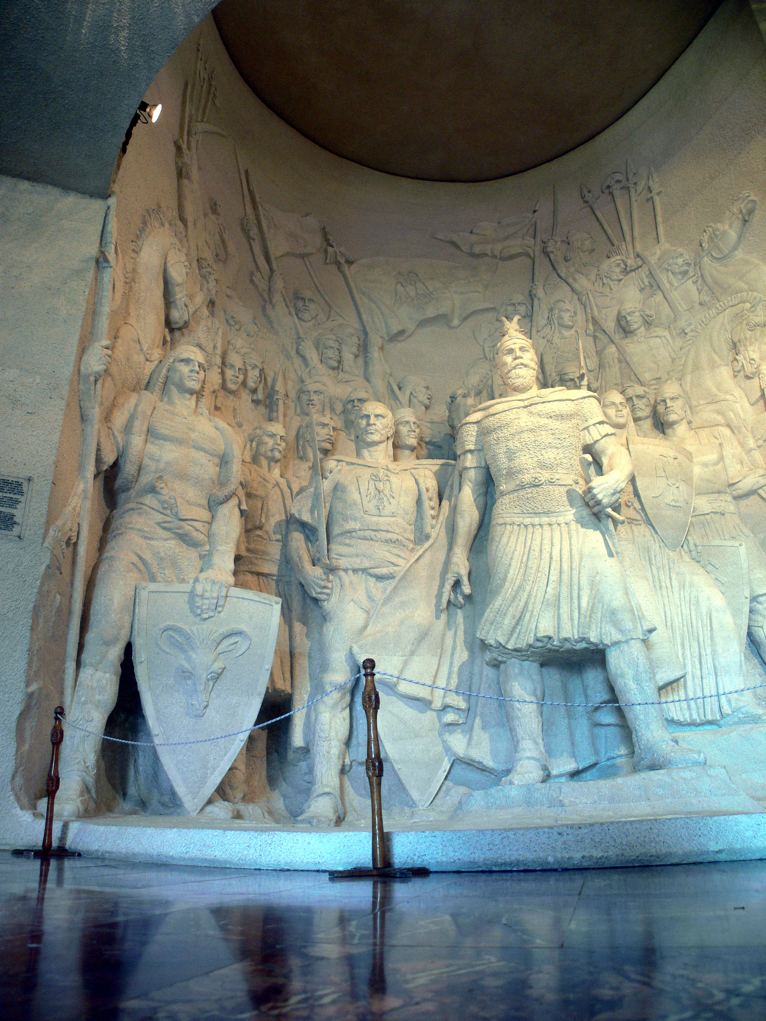 Eingangshalle des Museums in Krujë